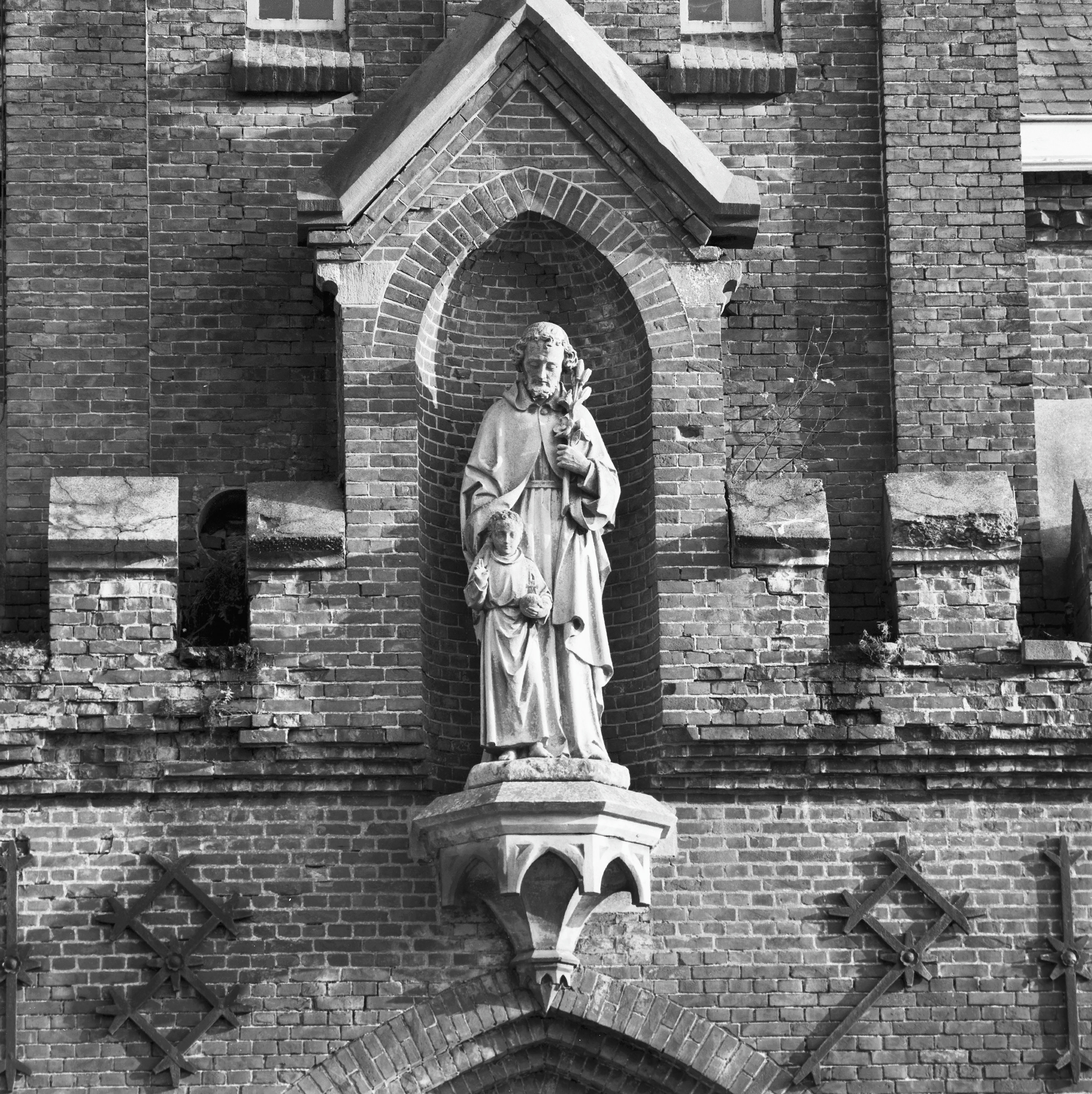 Trappistenklooster: Exterieur brouwerijgedeelte, heiligenbeeld boven ingangspartij